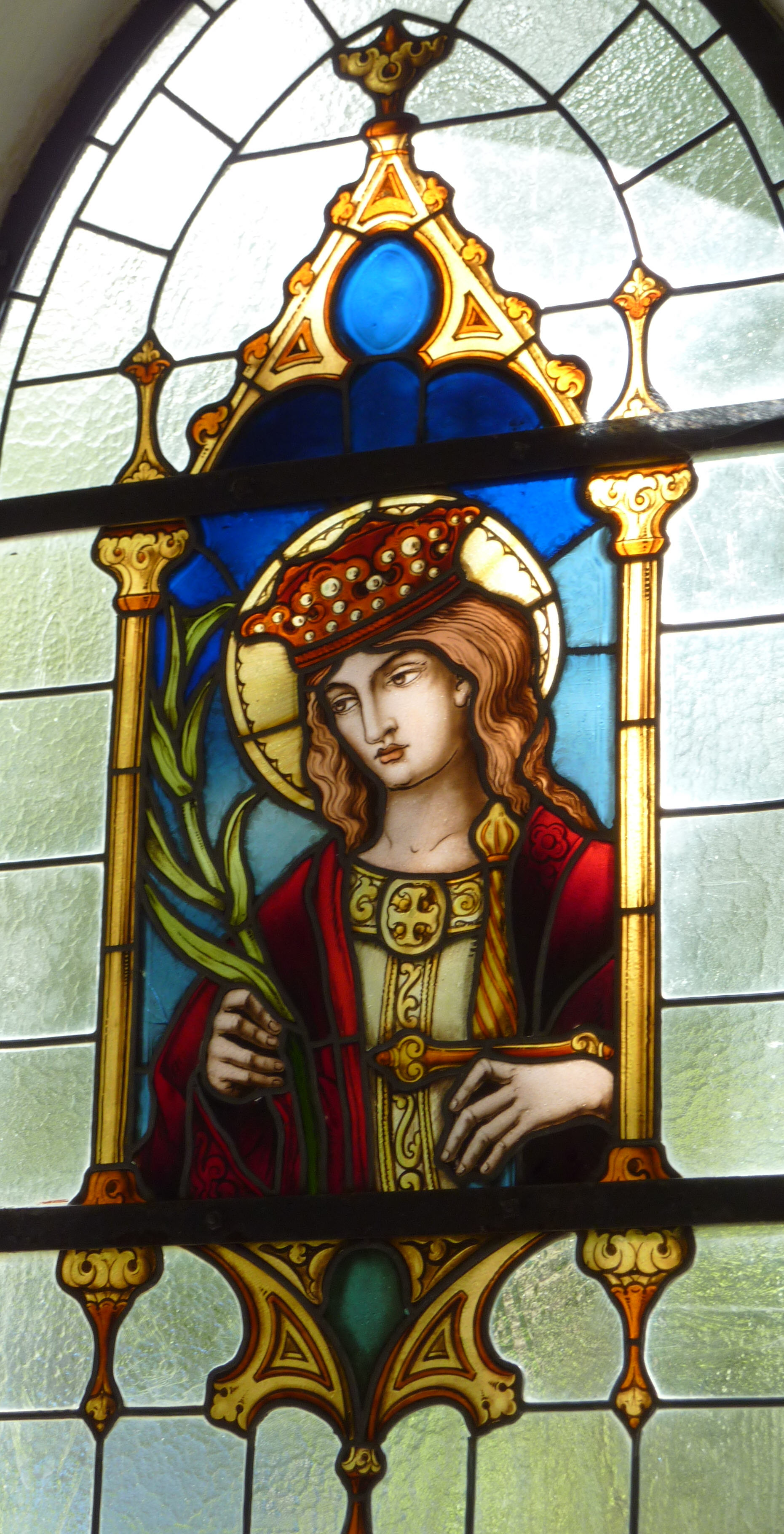 Fenster der Kapelle St. Katharina und St. Silvester in Imberg